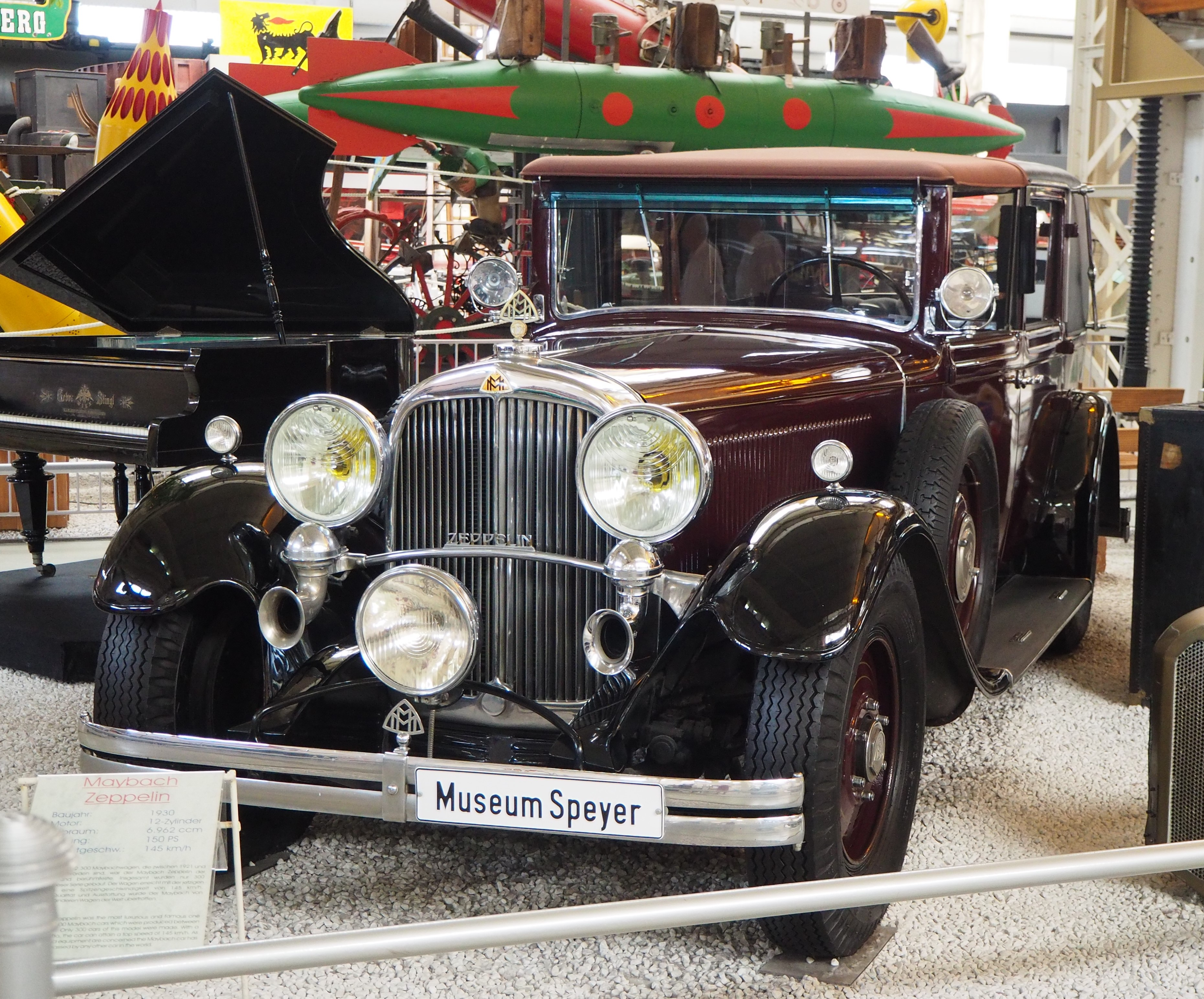 1930 Maybach Zeppelin DS7